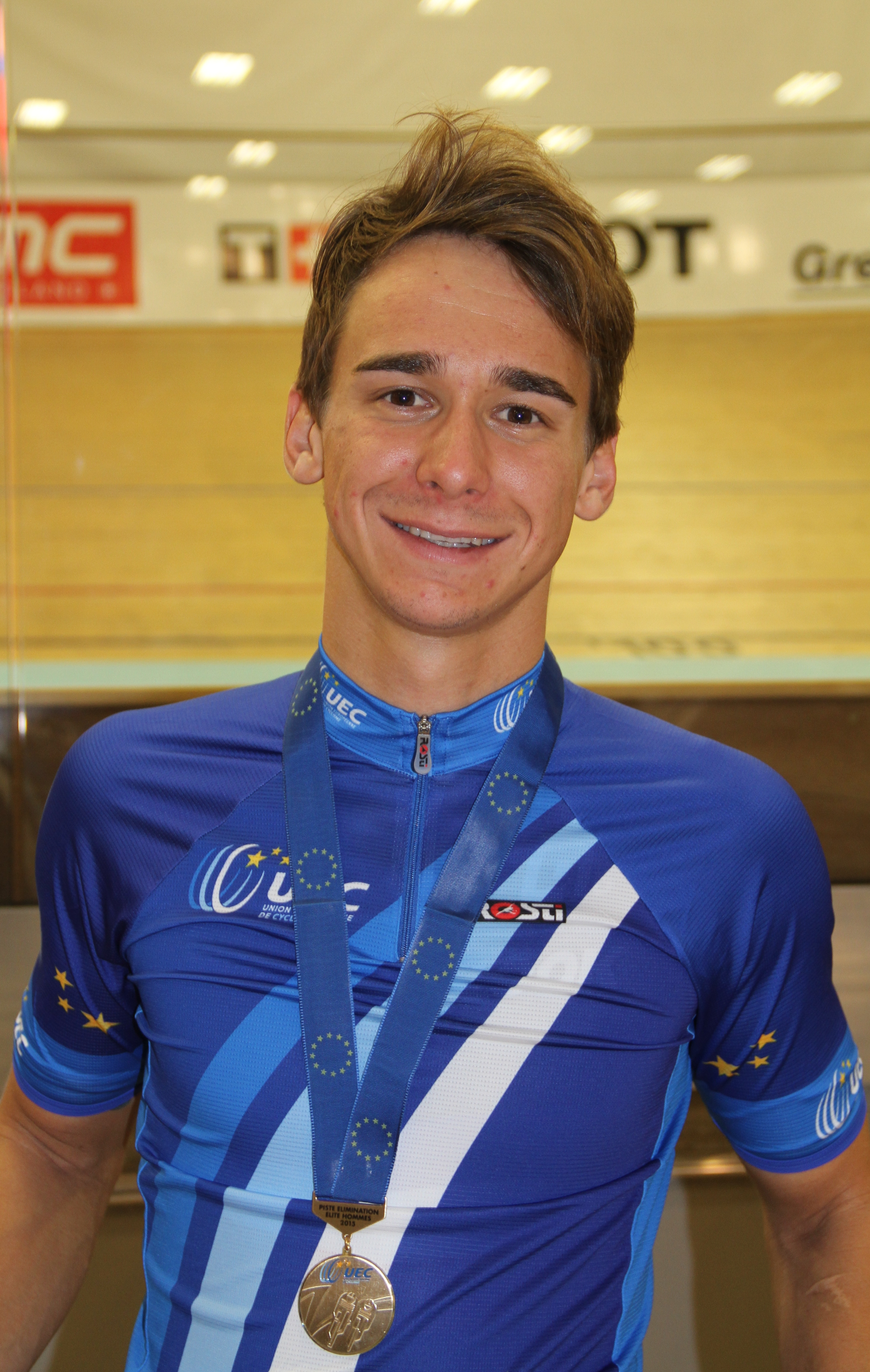 Bryan Coquard, franz. Radsportler, Europameister im Ausscheidungsfahren The making of this document was supported by the Community-Budget of Wikimedia Germany.